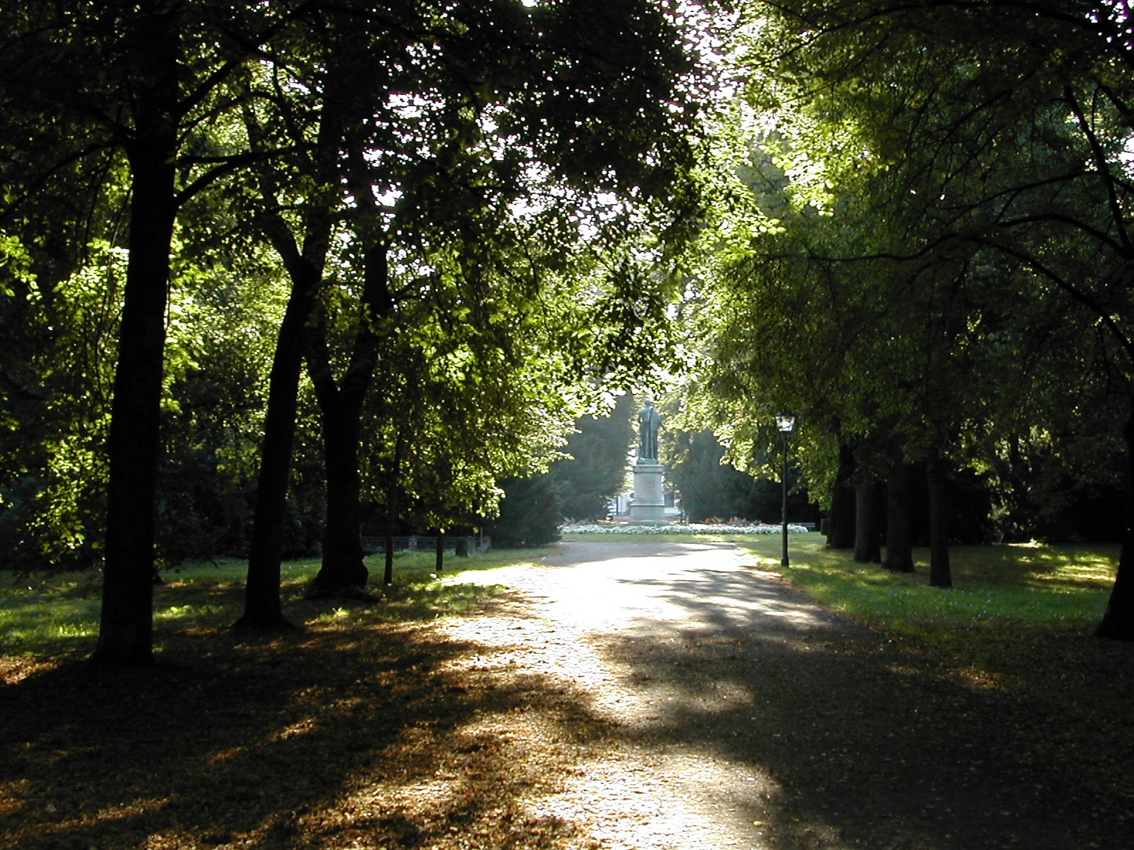 Magdeburg, Nordpark, Ost-West-Achse, 2004 selbst photographiert GNU_FDL --Wanzo 23:58, 12. Nov 2004 (CET)